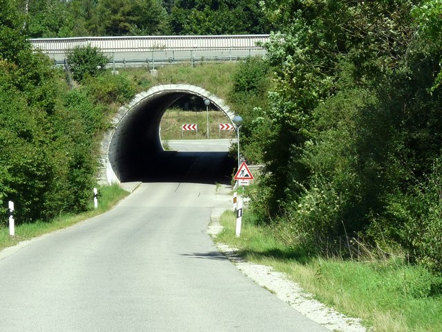 Durchlass unter der A 94 bei Ammerthal